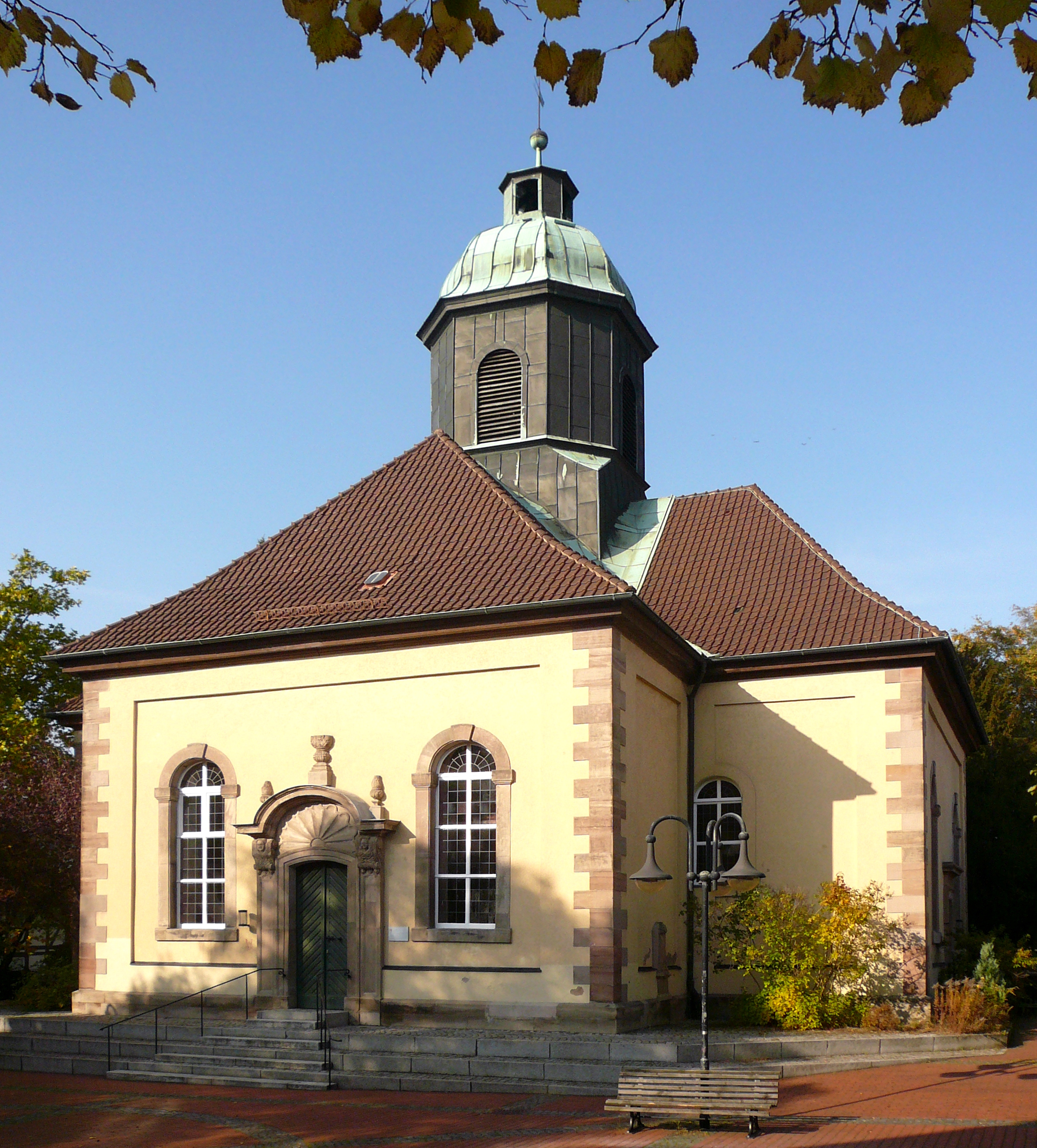 Ev.-luth. Kirche St. Martin in Geismar, Stadt Göttingen, Niedersachsen. Erbaut 1737–1743 durch die Herren von Hardenberg